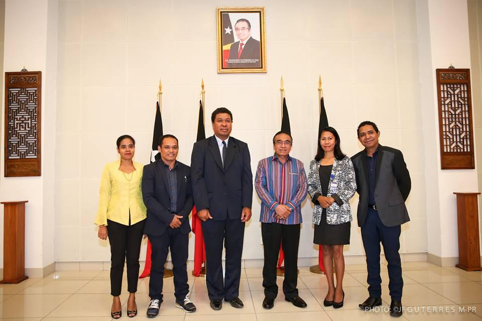 Delegation des Presserats Osttimors mit Virgílio da Silva Guterres bei Staatspräsident Francisco Guterres